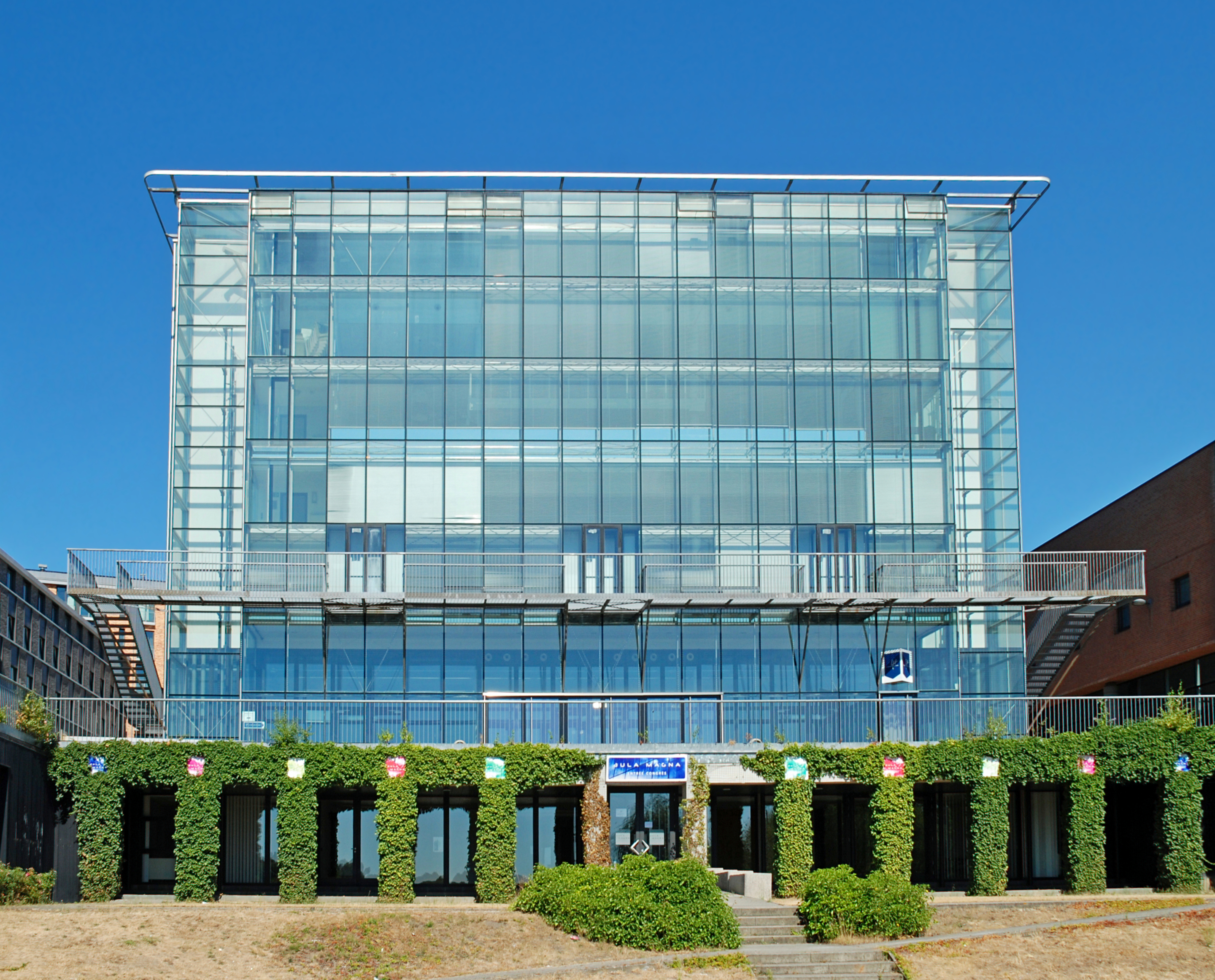 Belgique - Louvain-la-Neuve - Aula Magna (postmodernisme, bureau d'architecture Philippe Samyn and Partners, 1999-2001)